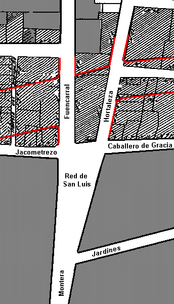 Plano de la Red de San Luis antes de la construcción de la Gran Vía. Los contornos de la Gran Vía están marcados en rojo. Obra propia basada en el plano-proyecto de la Gran Vía fechado 30 de Septiembre de 1904 y firmado por los arquitectos José López Salaverri y Francisco Andrés Octavio.